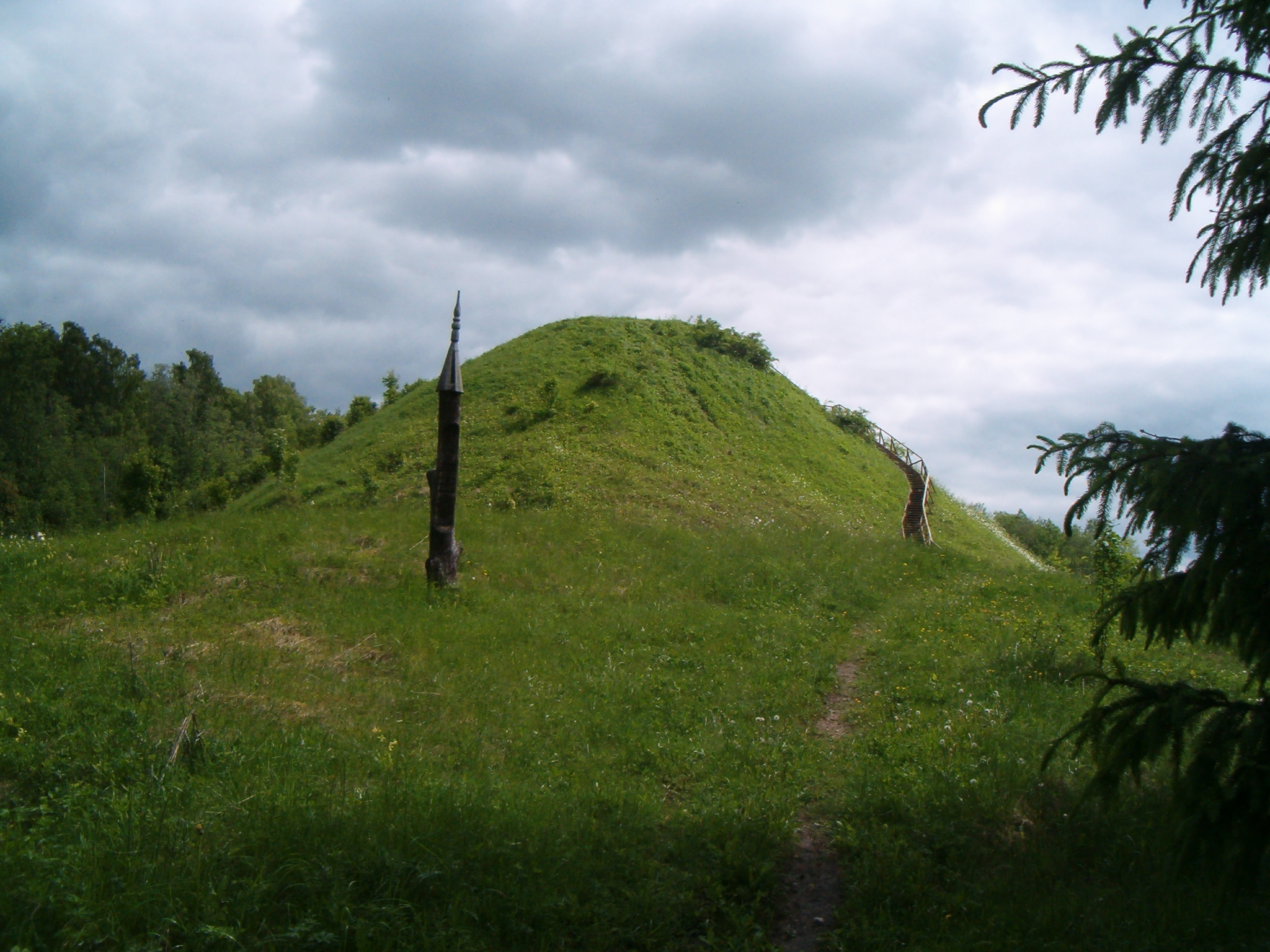 Užpalių sen., Lithuania